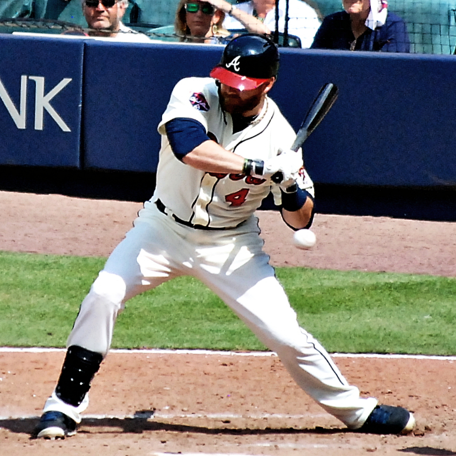 Ryan Doumit